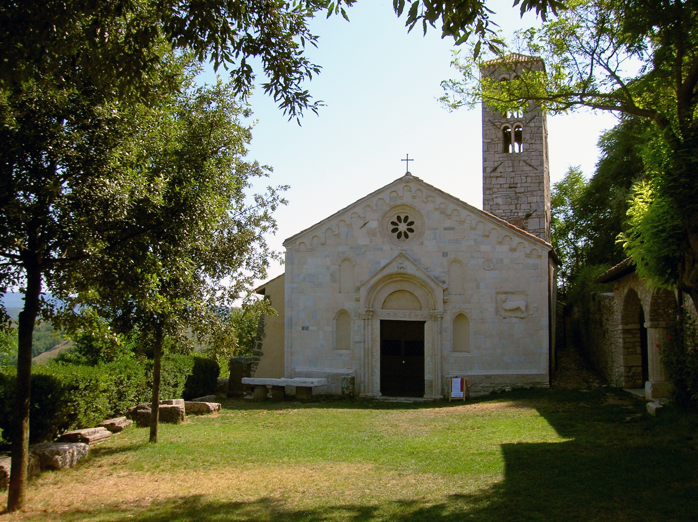 Chiesa di Santa Vittoria nell'area di Trebula Mutuesca, nei pressi di Monteleone Sabino, Lazio, Italia.